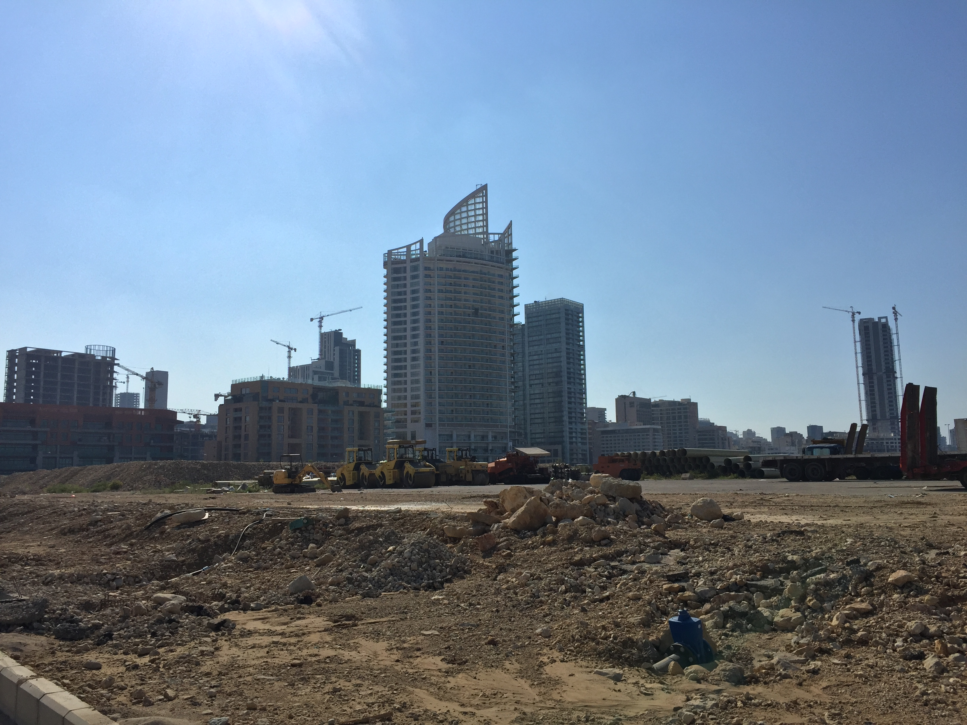 Immeubles sur la cote de Beyrouth